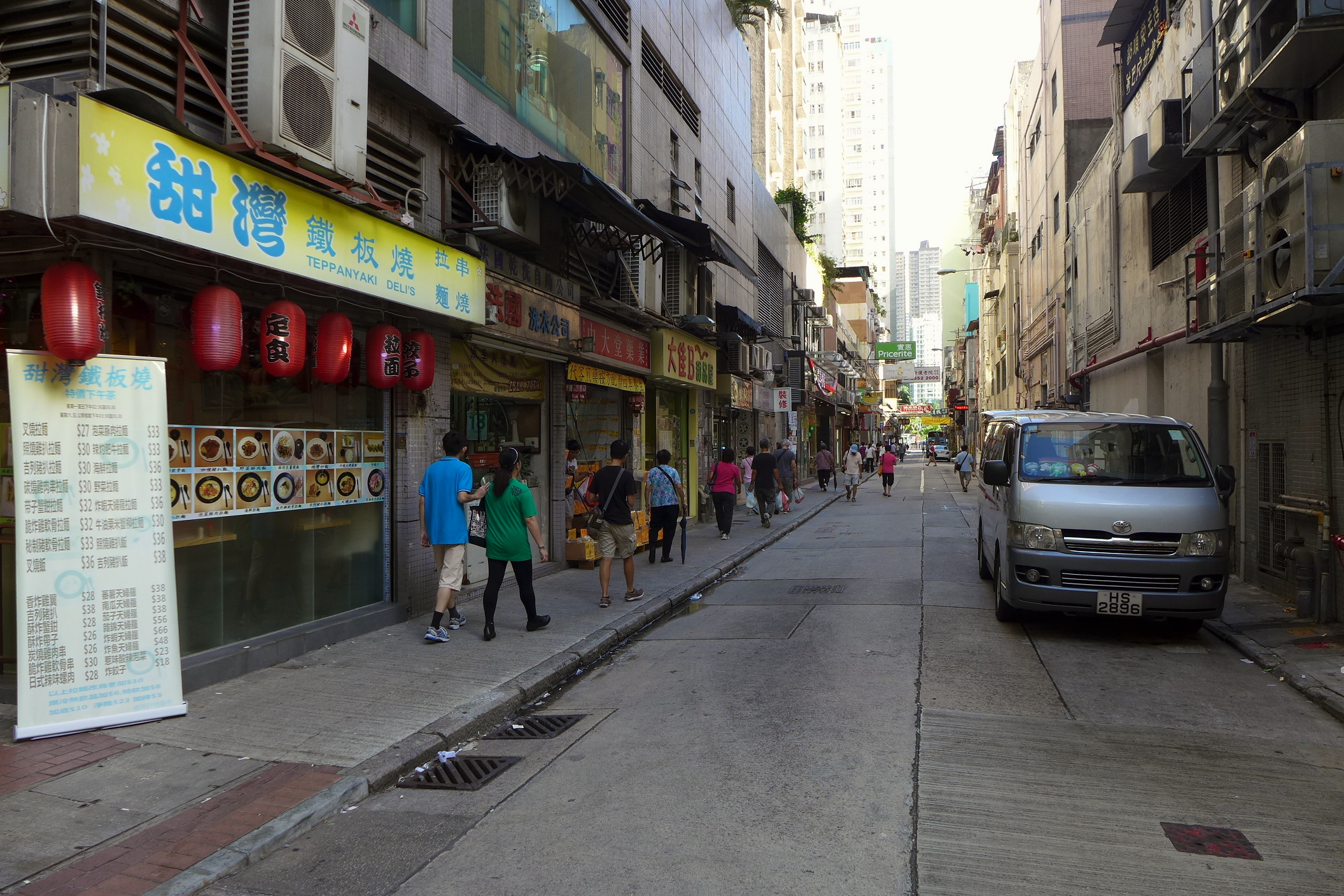 Old Main Street Aberdeen